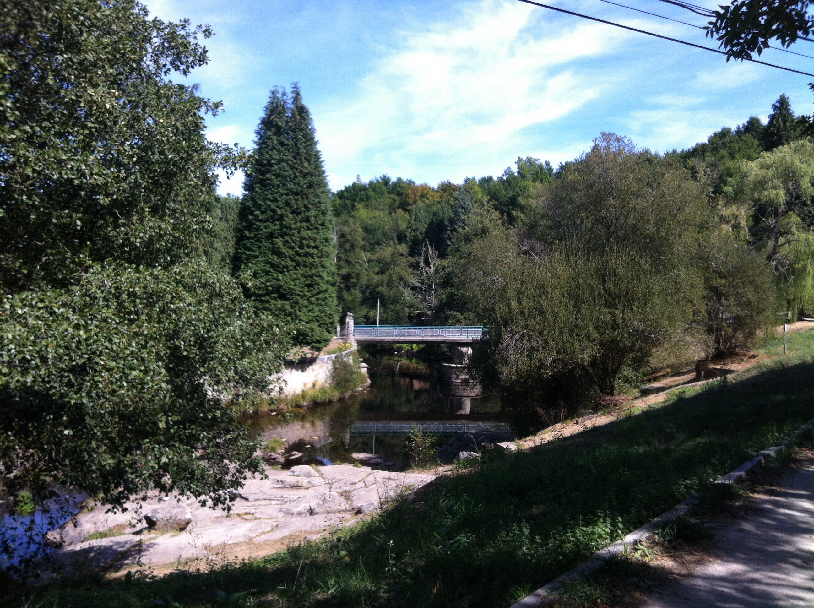 Zona de baño del Río Arenteiro junto al puente de la piscifactoria de O Carballiño.